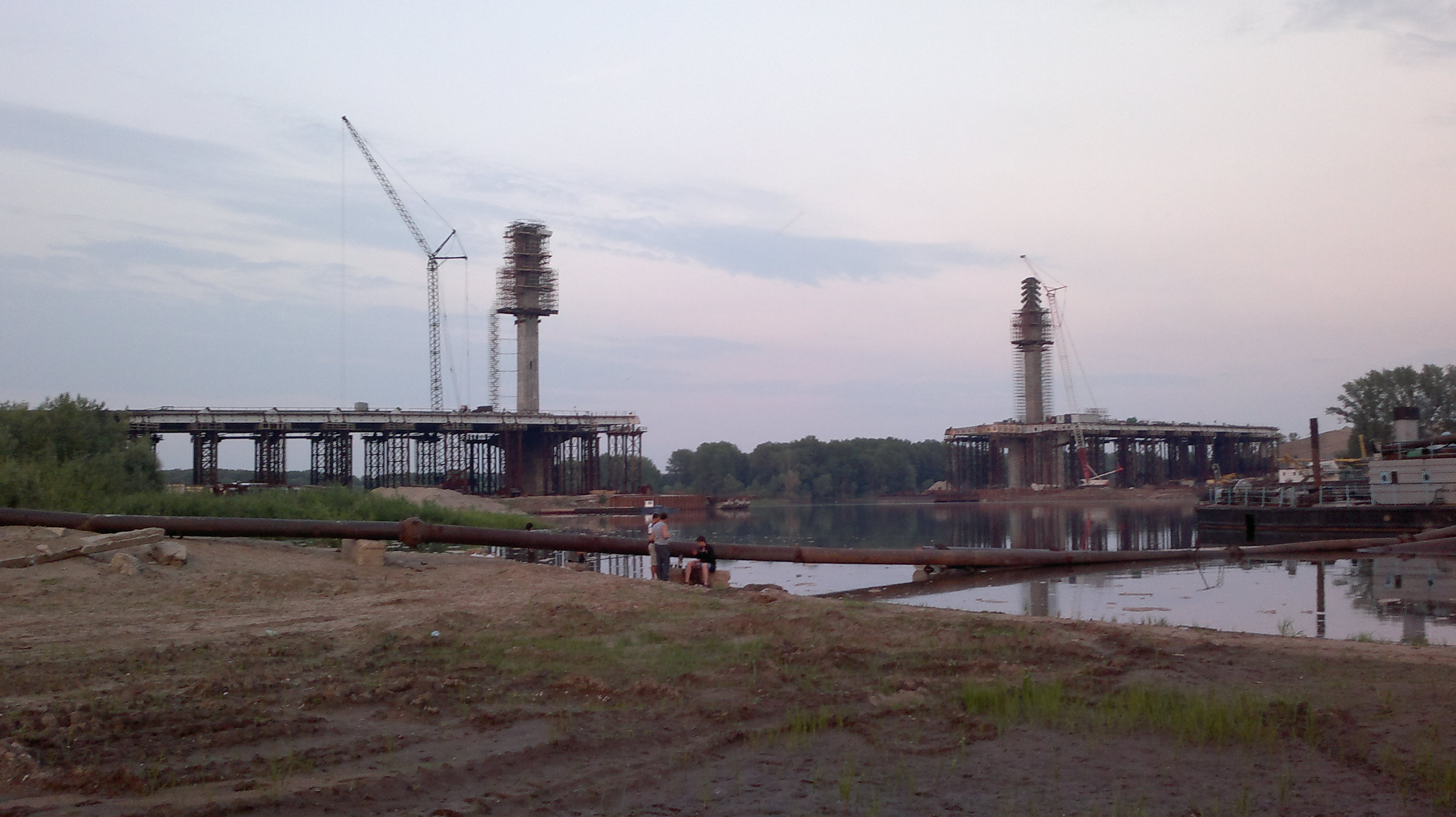 Кировский автомобильный мост пересекает р. Самара.